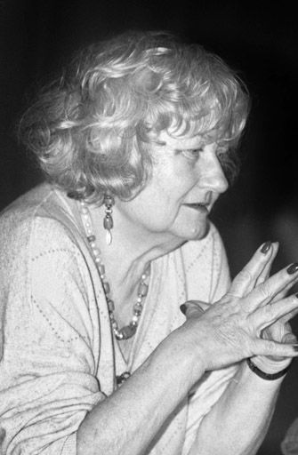 Die Schriftstellerin Anne Rose Katz wärend einer Lesung in Gräfelfing 1992. Veröffentlicht in Münchner Merkur Nr. 106, 8. Mai 1992, Seite W1: Frauen beim Fernsehen sind „perfekt alterslos“